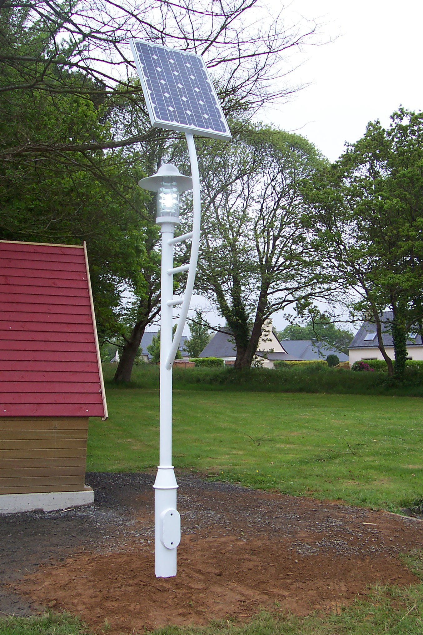 Lampadaire solaire de la gamme IMEXLAMP d'IMEX CGI éclairant un arrêt de car